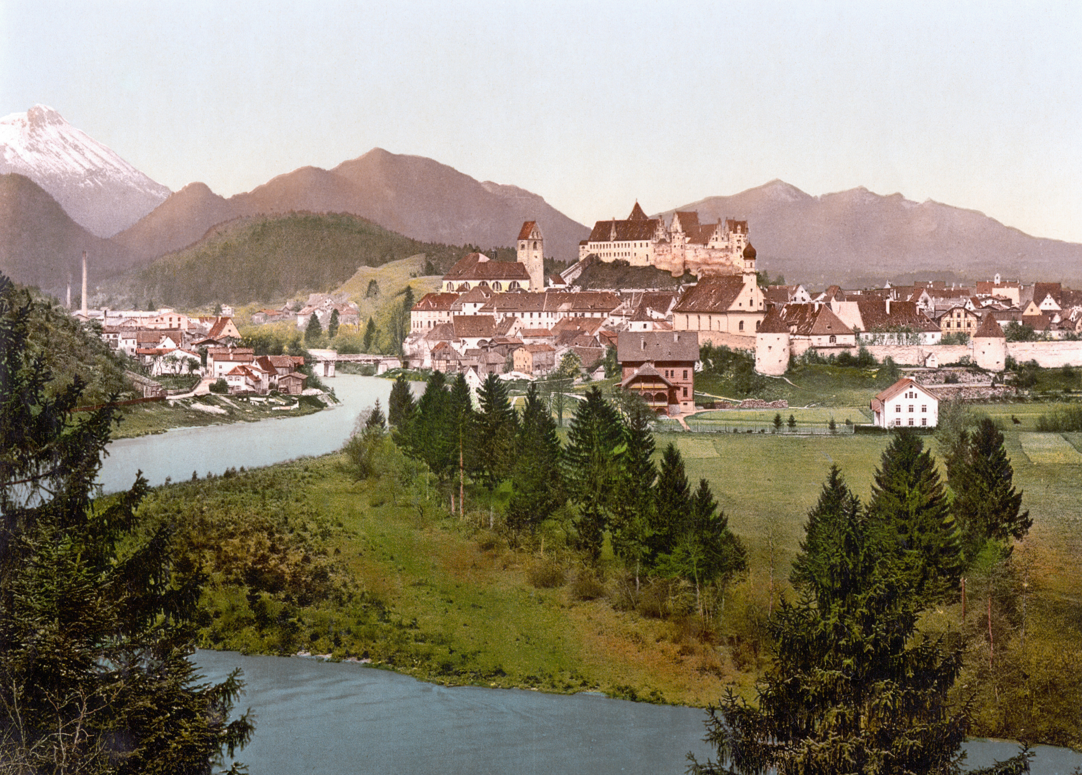 Füssen um 1900